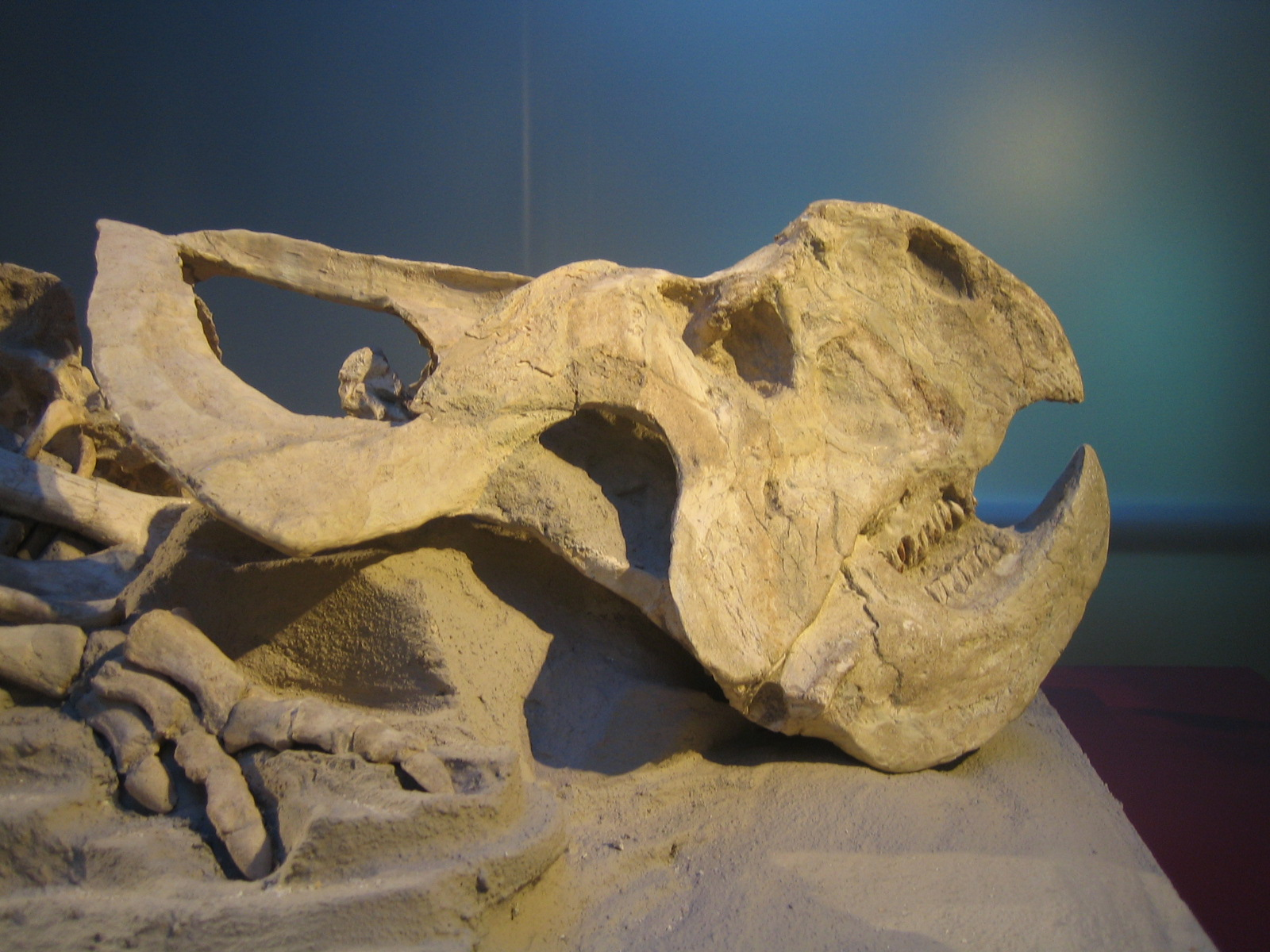 Protoceratops andrewsi in Cosmocaixa, Barcelona